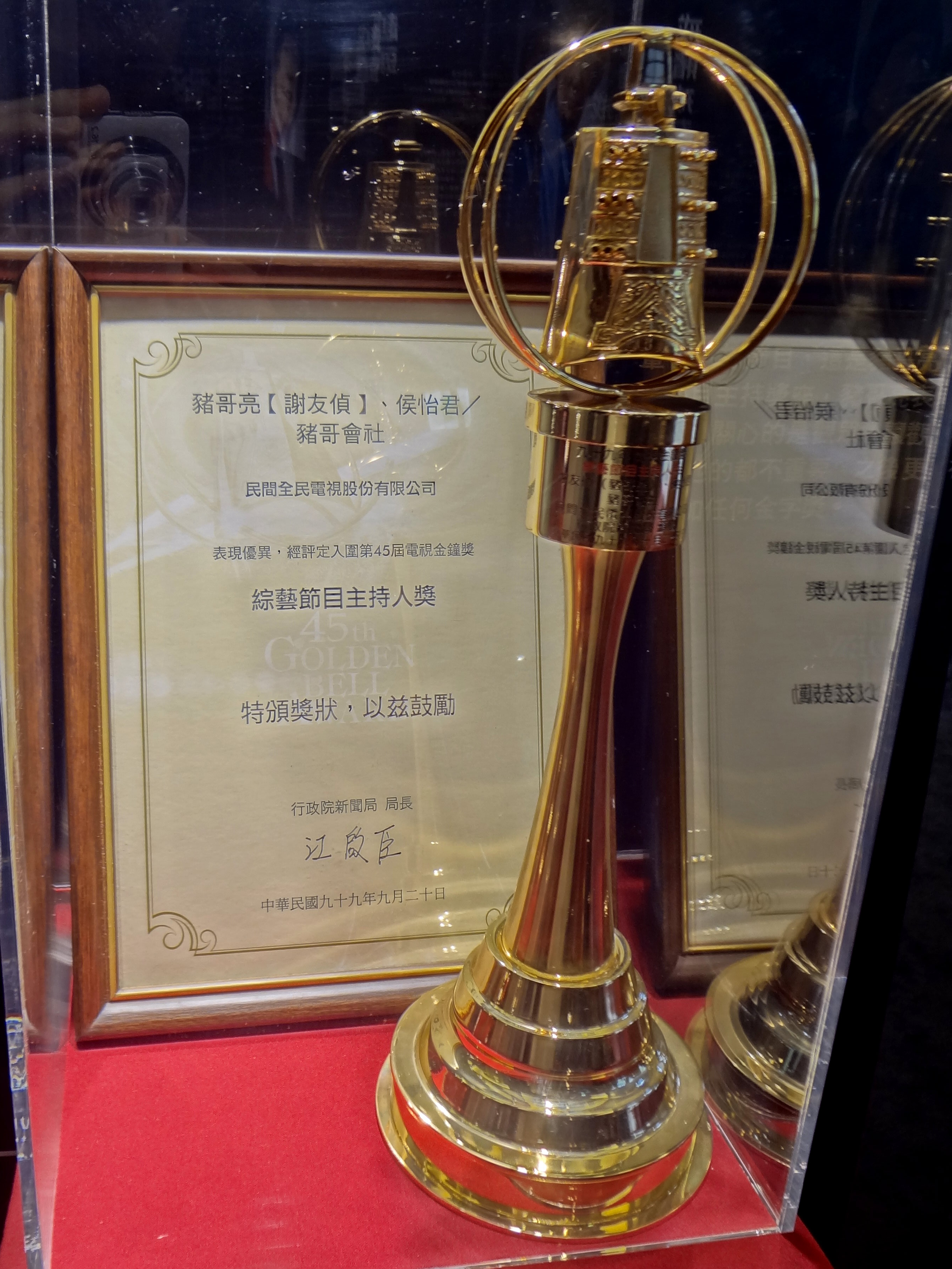 豬哥亮永恆時代展，民間全民電視公司綜藝節目《豬哥會社》於第45屆金鐘獎獲頒之電視金鐘獎綜藝節目主持人獎獎狀及講座。